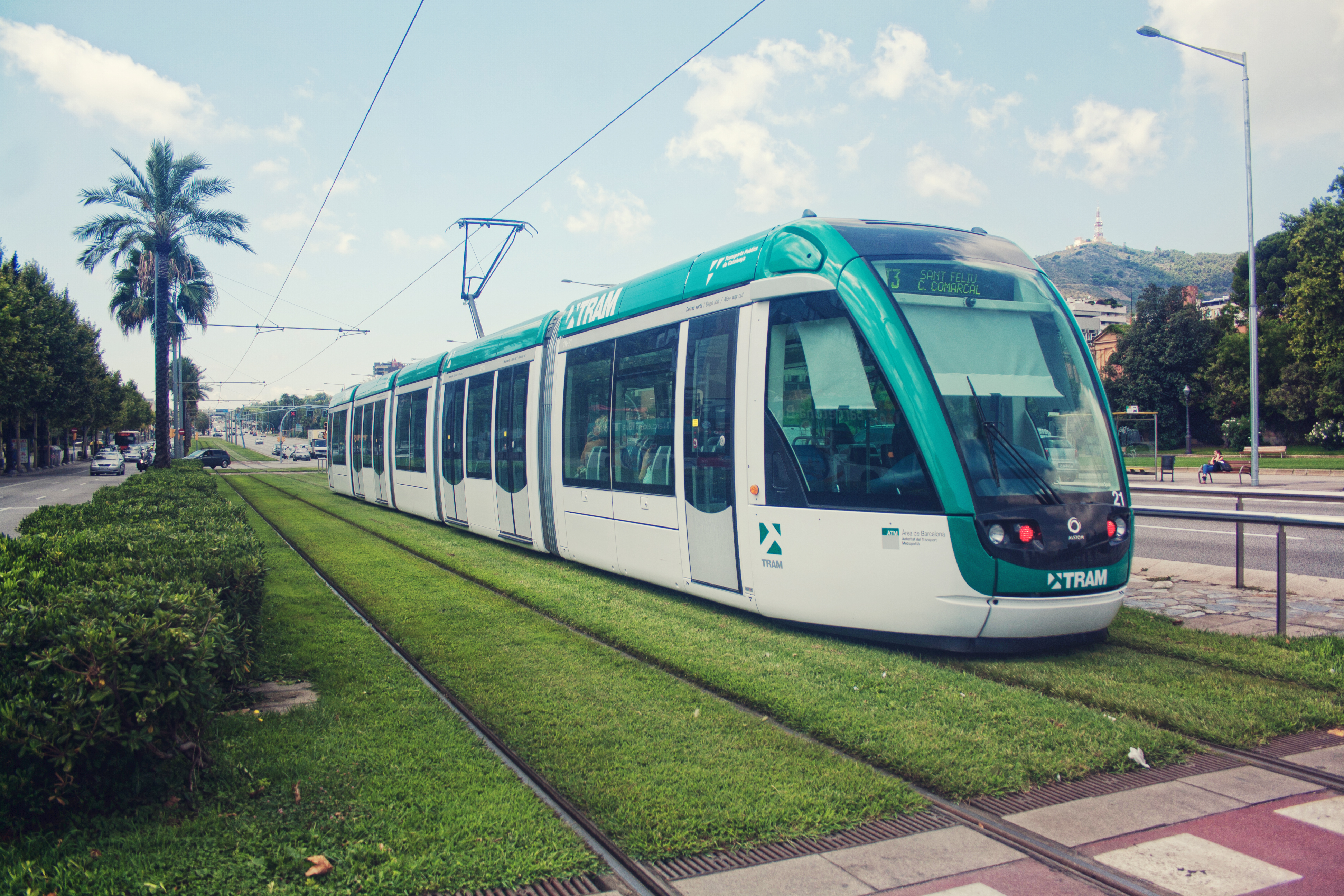 Barcelona, España